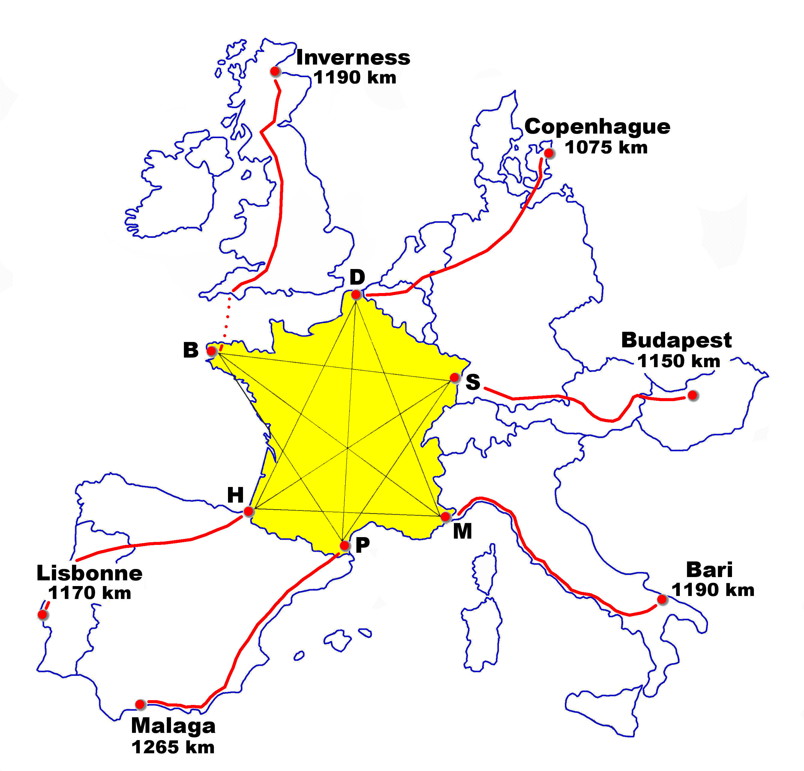 Carte des EuroDiagonales